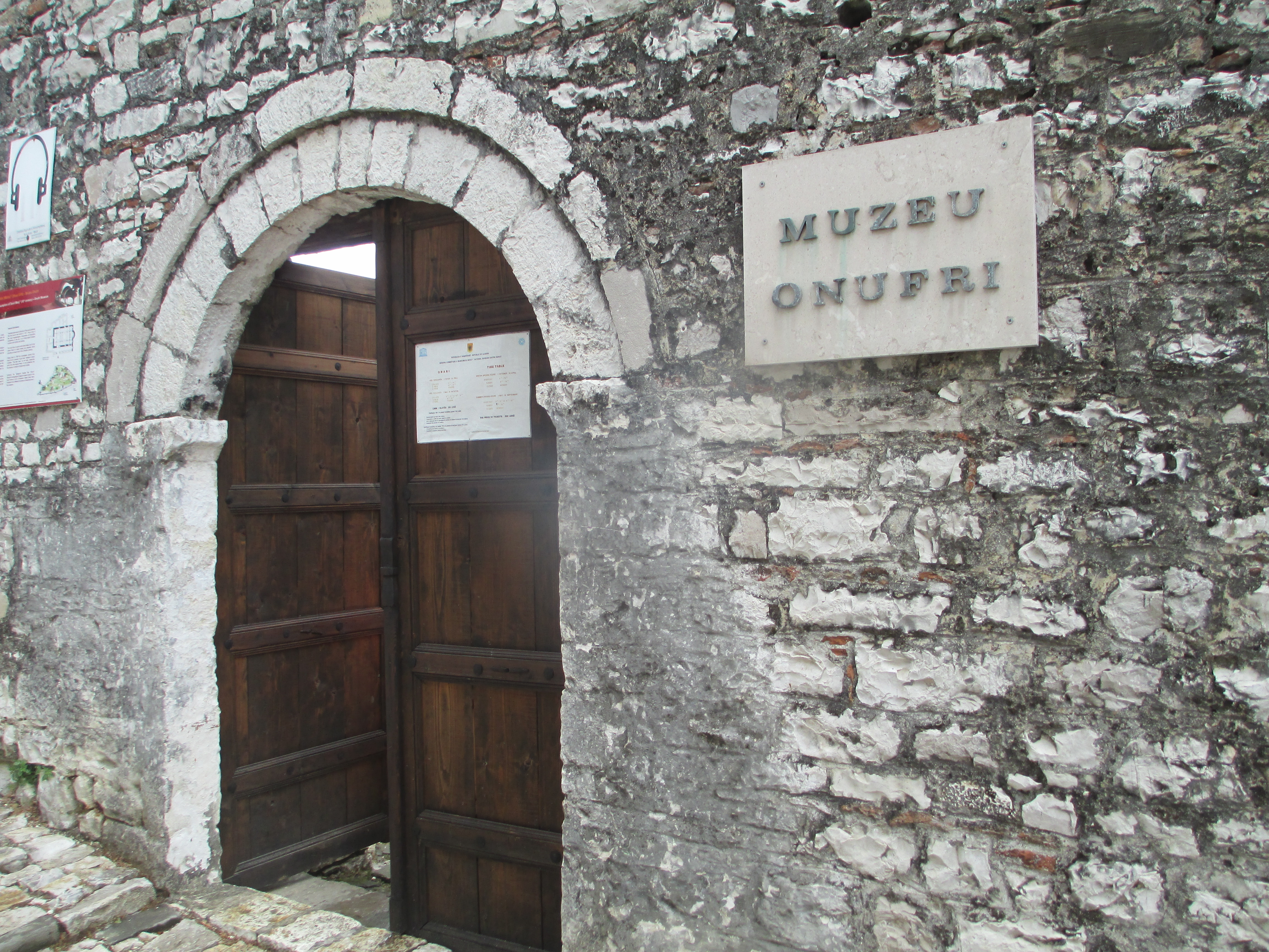 מוזיאון אונופרי במצודת בראט